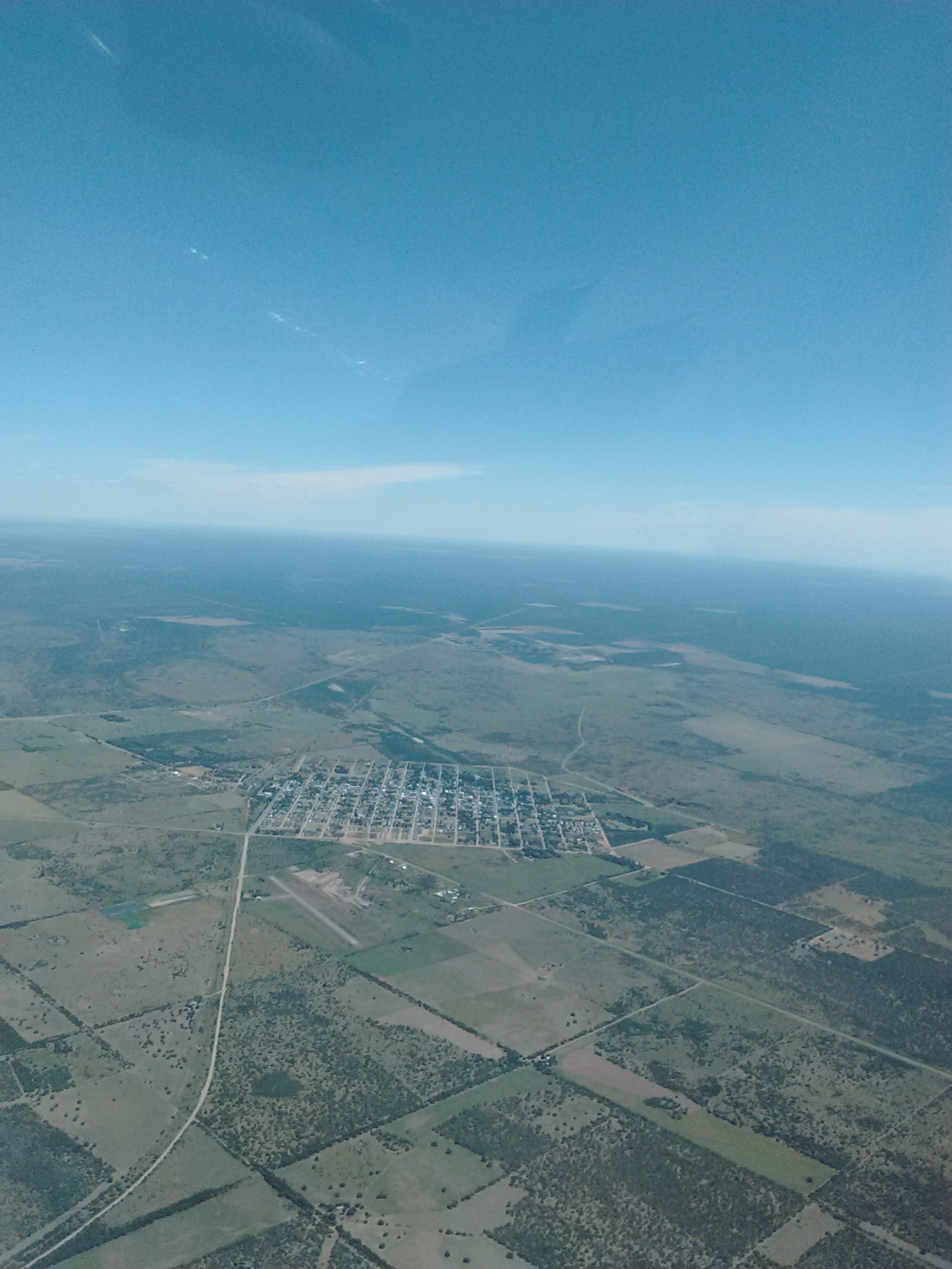 Vista aerea de Victorica, La Pampa